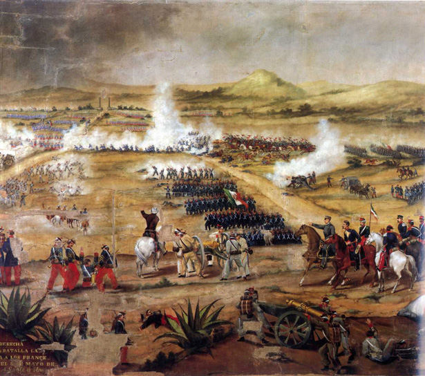 Anónimo, Batalla del 5 de mayo de 1862, óleo sobre tela, Museo Nacional de las Intervenciones, Exconvento de Churubusco, INAH. Imagen tomada del libro: Eduardo Báez, La pintura militar en el siglo XIX, México, Secretaría de la Defensa Nacional, 1992, p. 102.